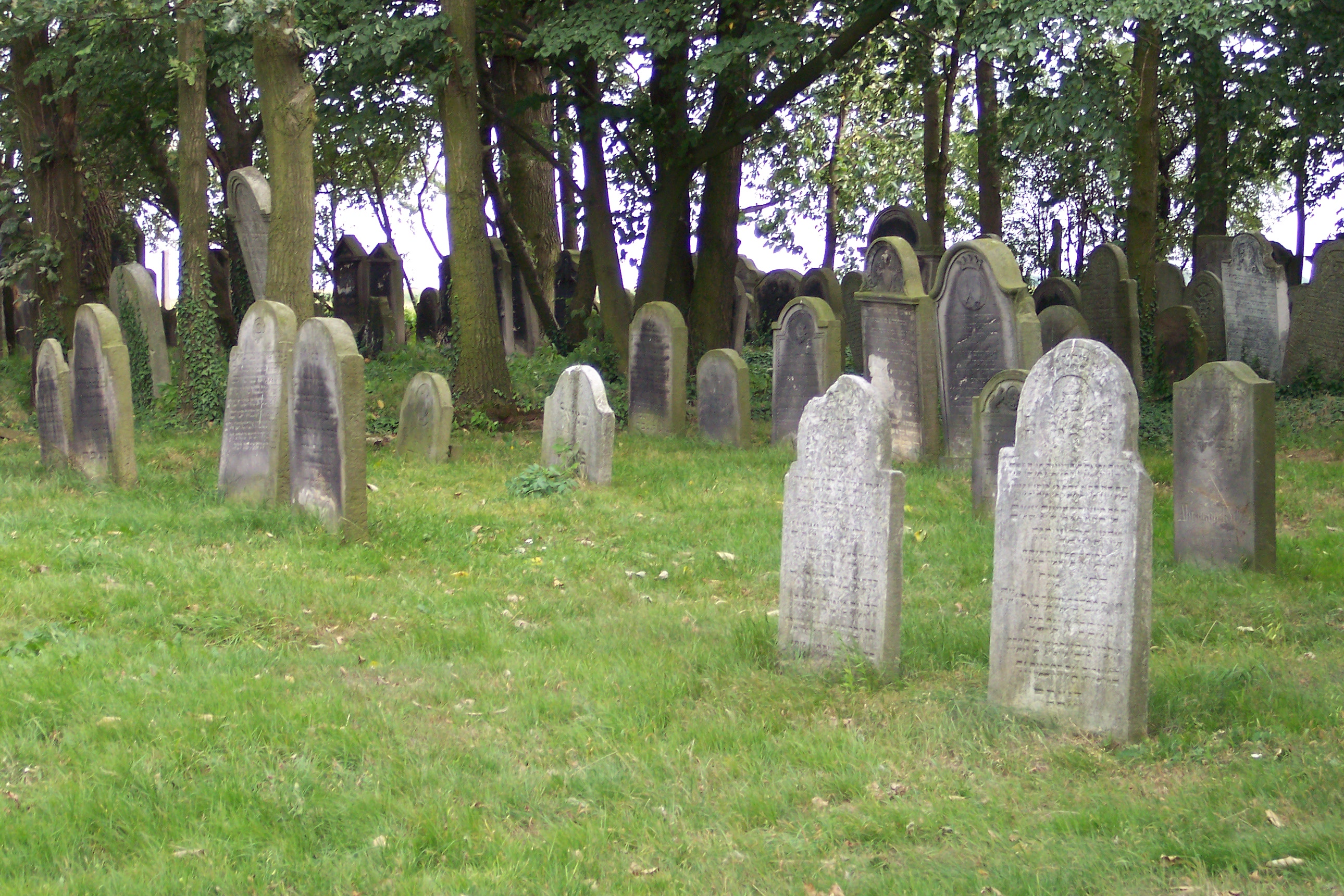 Jüdischer Friedhof in Langendorf, Oberschlesien